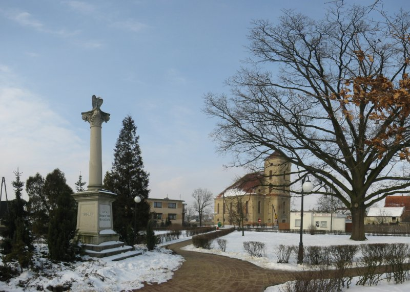 Plac 700-lecia w Zdunach